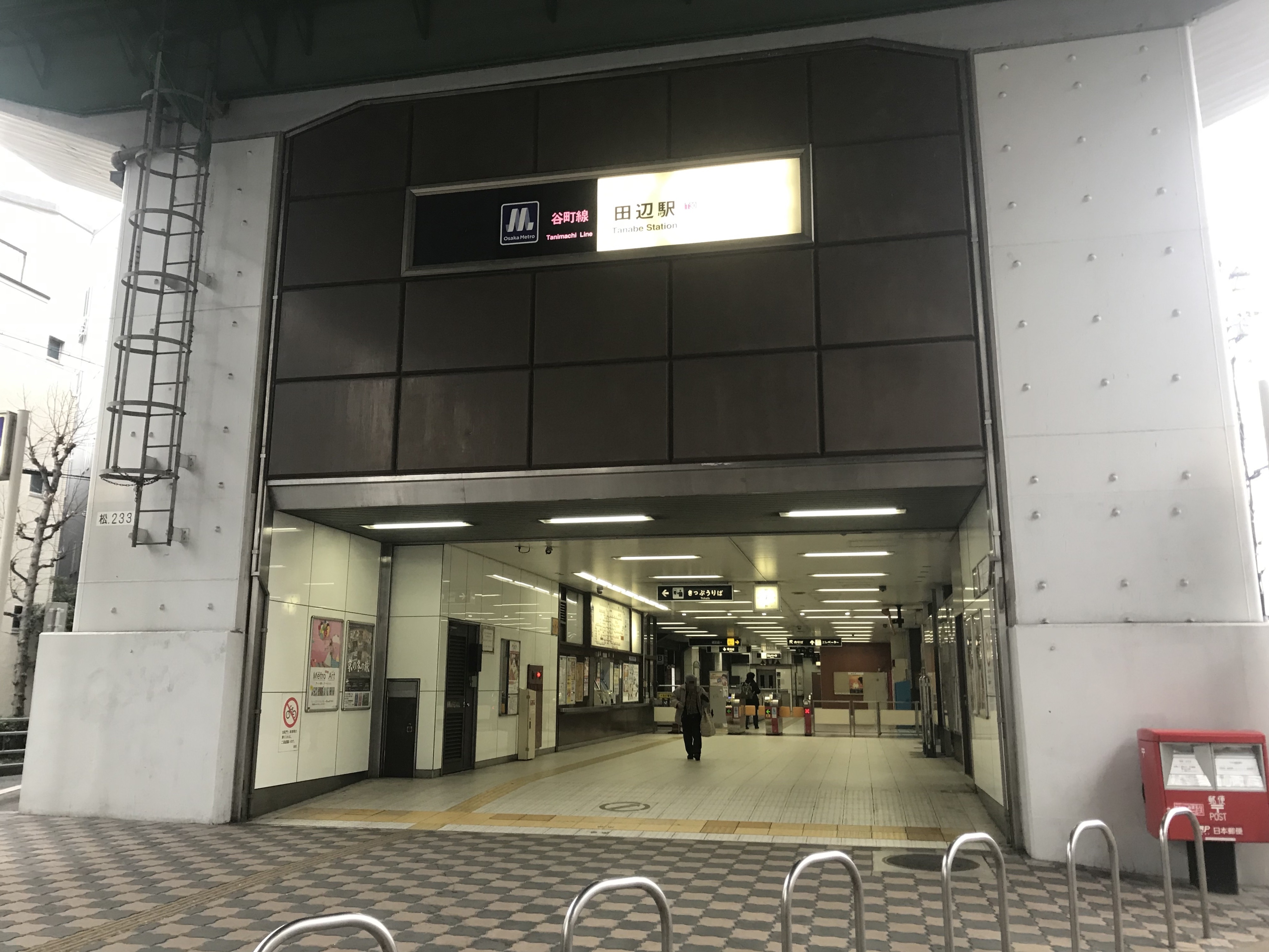 田辺駅の出入り口